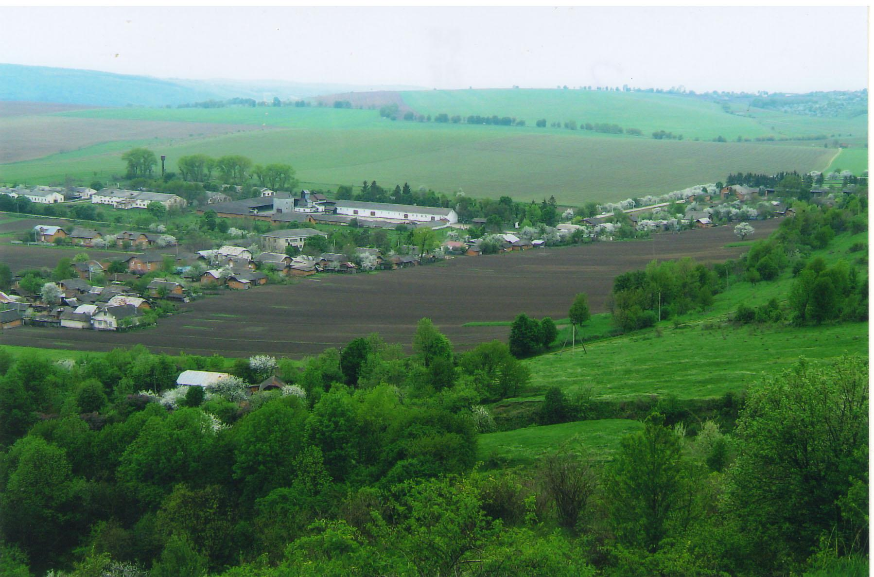 Ще один вид з гори